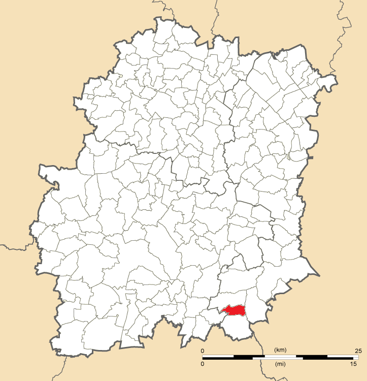 Carte de position de Prunay-sur-Essonne en Essonne (91)